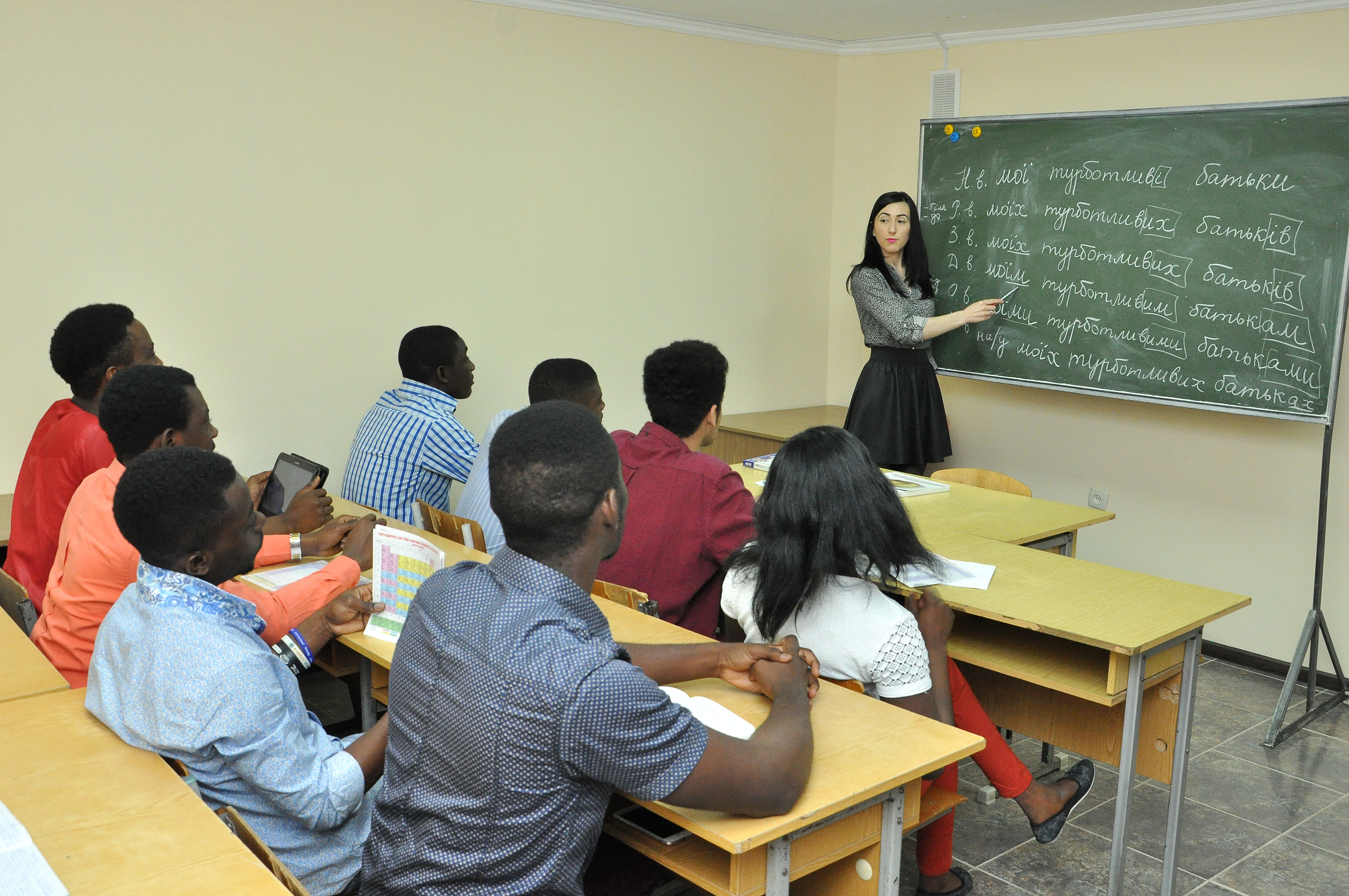 Підготовче відділення для іноземців та осіб без громадянства Тернопільського державного медичного університету імені І. Я. Горбачевського. Урок української мови проводить Марина Тимощук.